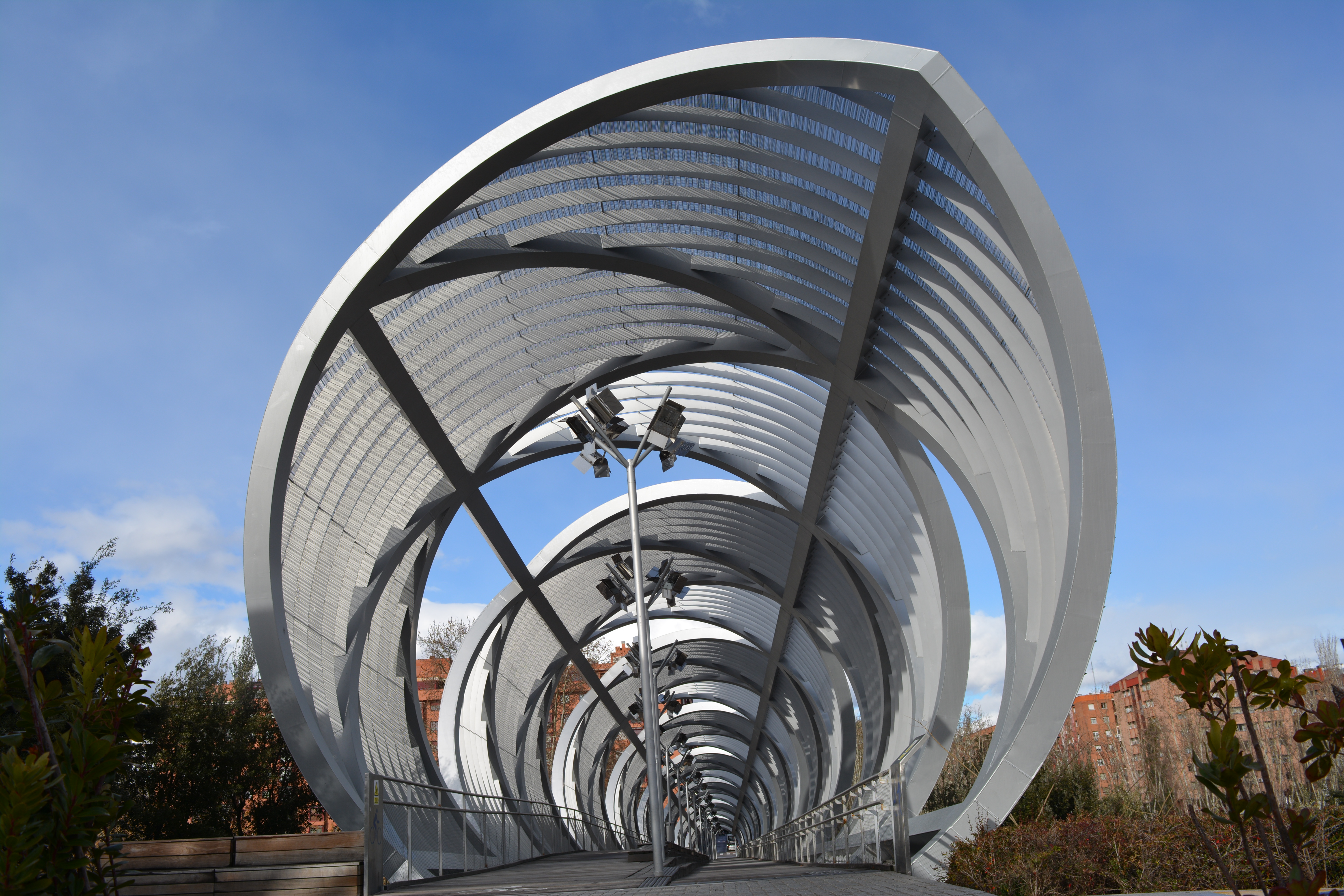 Vista interior centrada